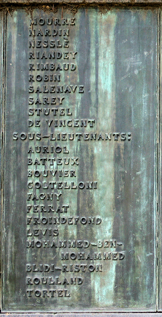 Una delle lapidi in bronzo con i cognomi dei caduti francesi del monumento a Napoleone III